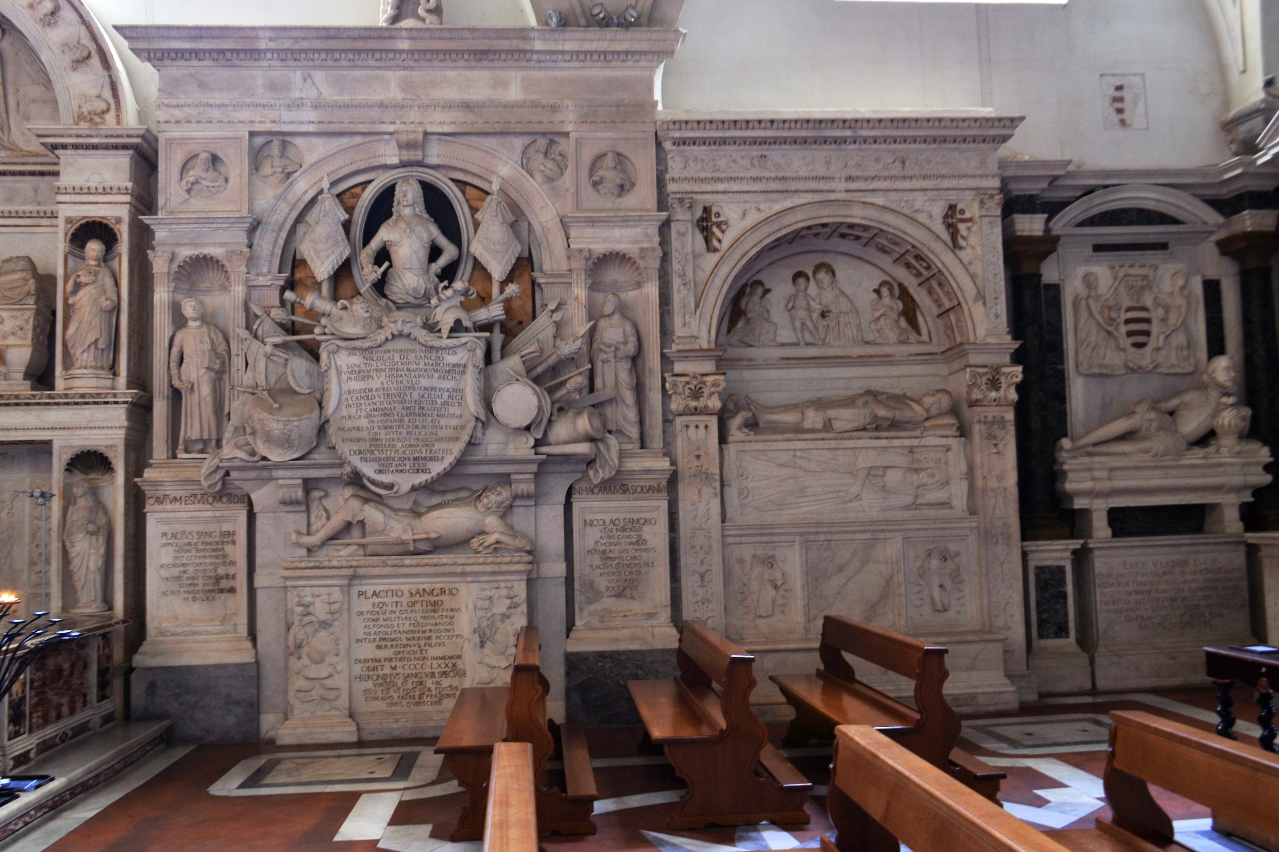 Chiesa di San Domenico Maggiore (Napoli) - Cappellone del Crocifisso; monumenti funebri ai Carafa lungo la parete destra